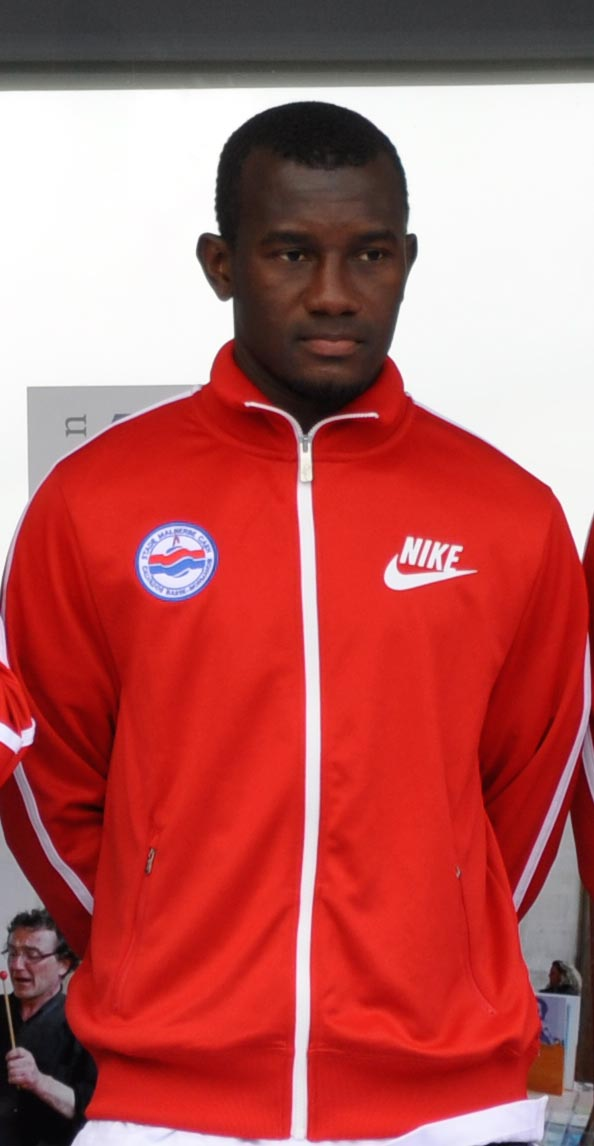 Jean-Jacques Pierre lors de la présentation des recrues de Caen.